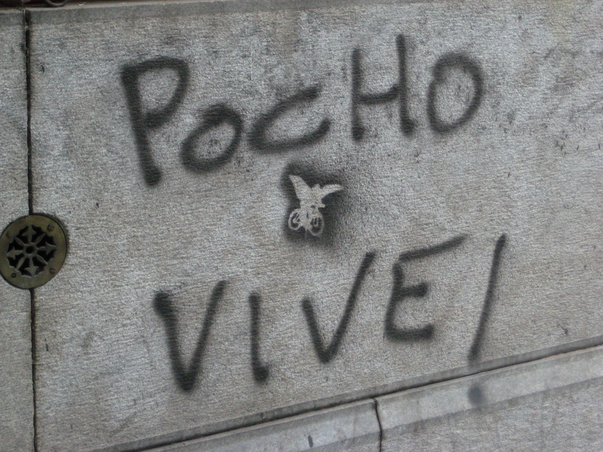 stencil sobre pocho "el angel de la bicicleta"